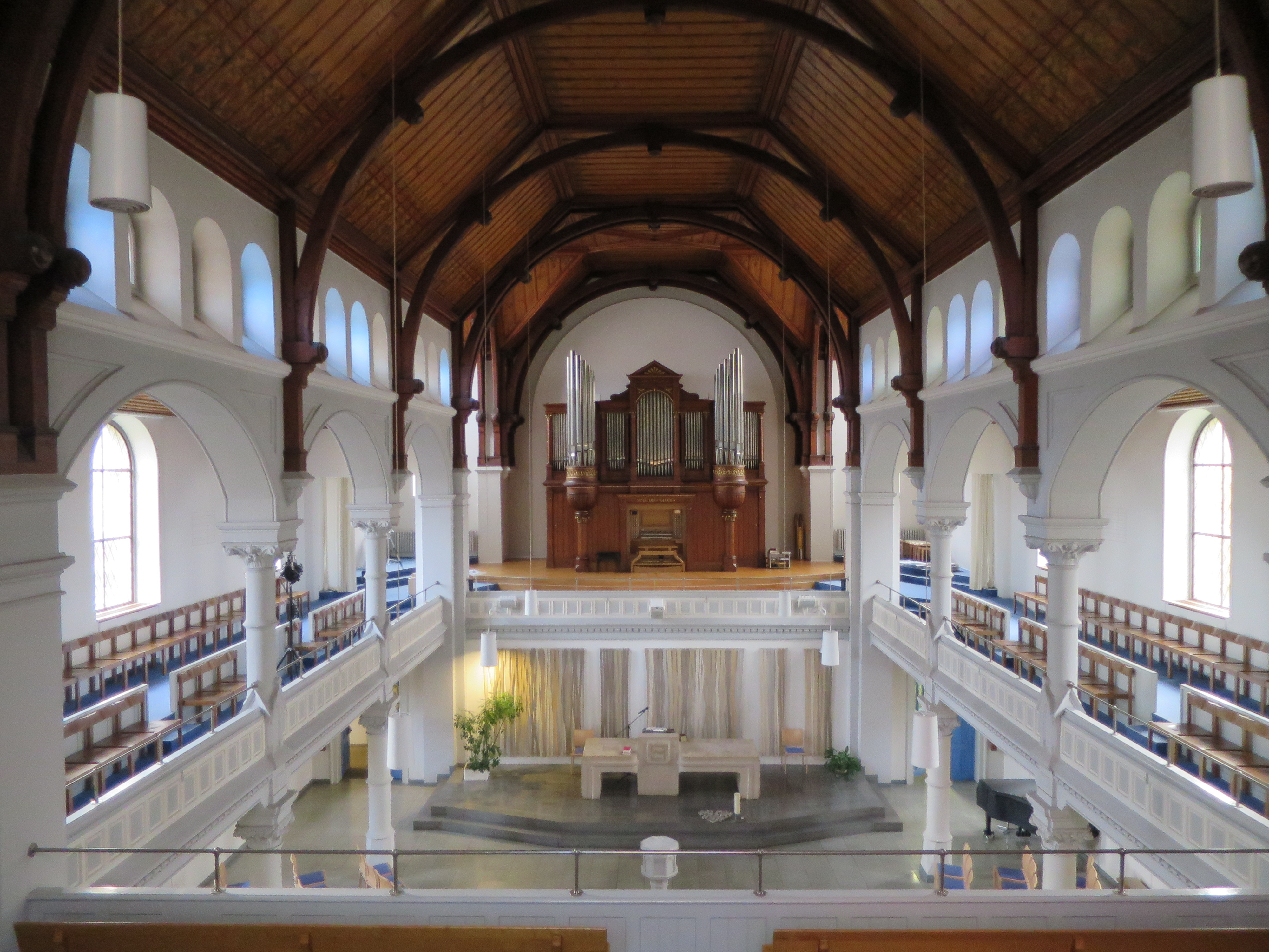 Reformierte Johanneskirche Zürich-Industriequartier: Innenraum